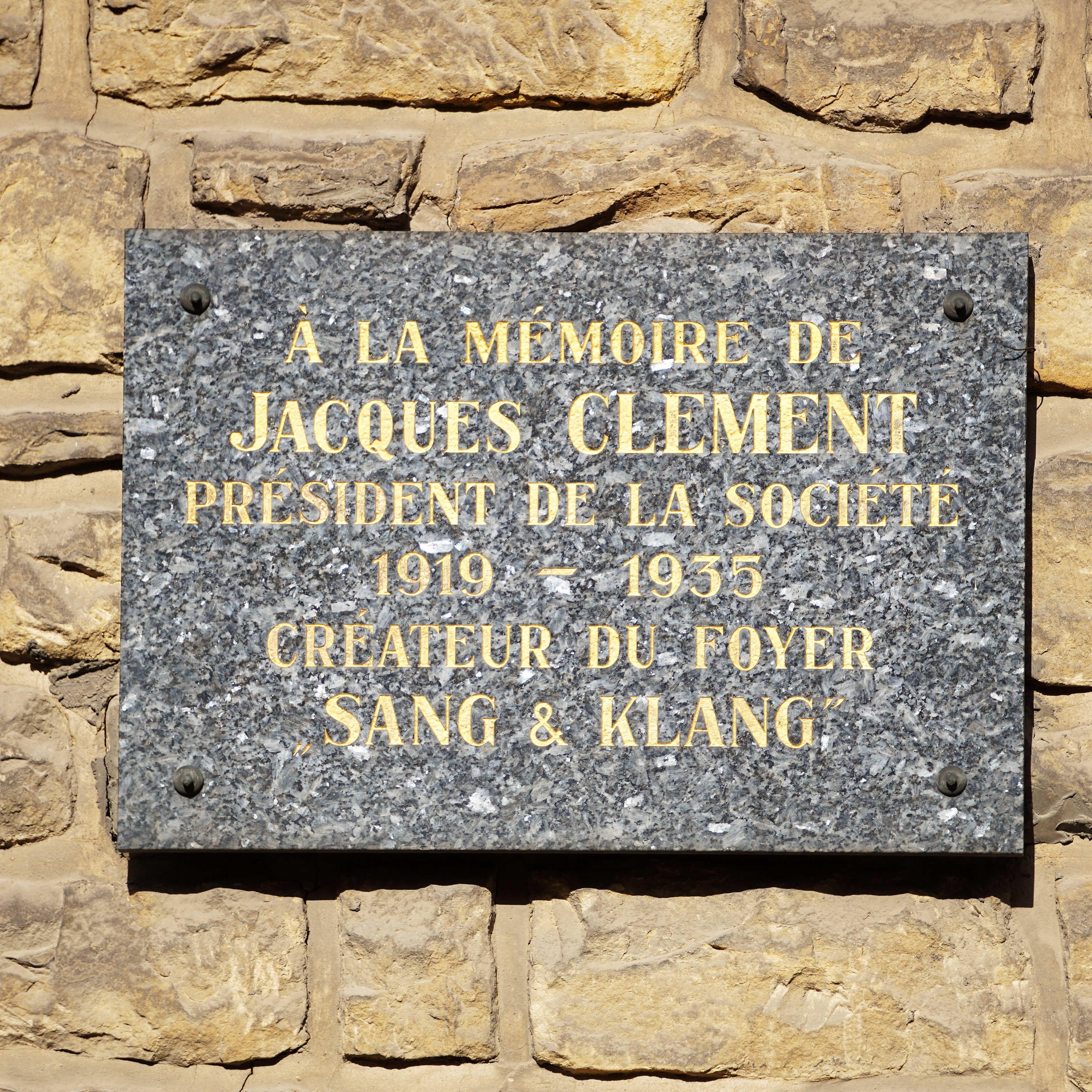 Luxembourg, quartier du Pfaffenthal: plaque "Jacques Clement" sur la maison de l'association "Sang a Klang".